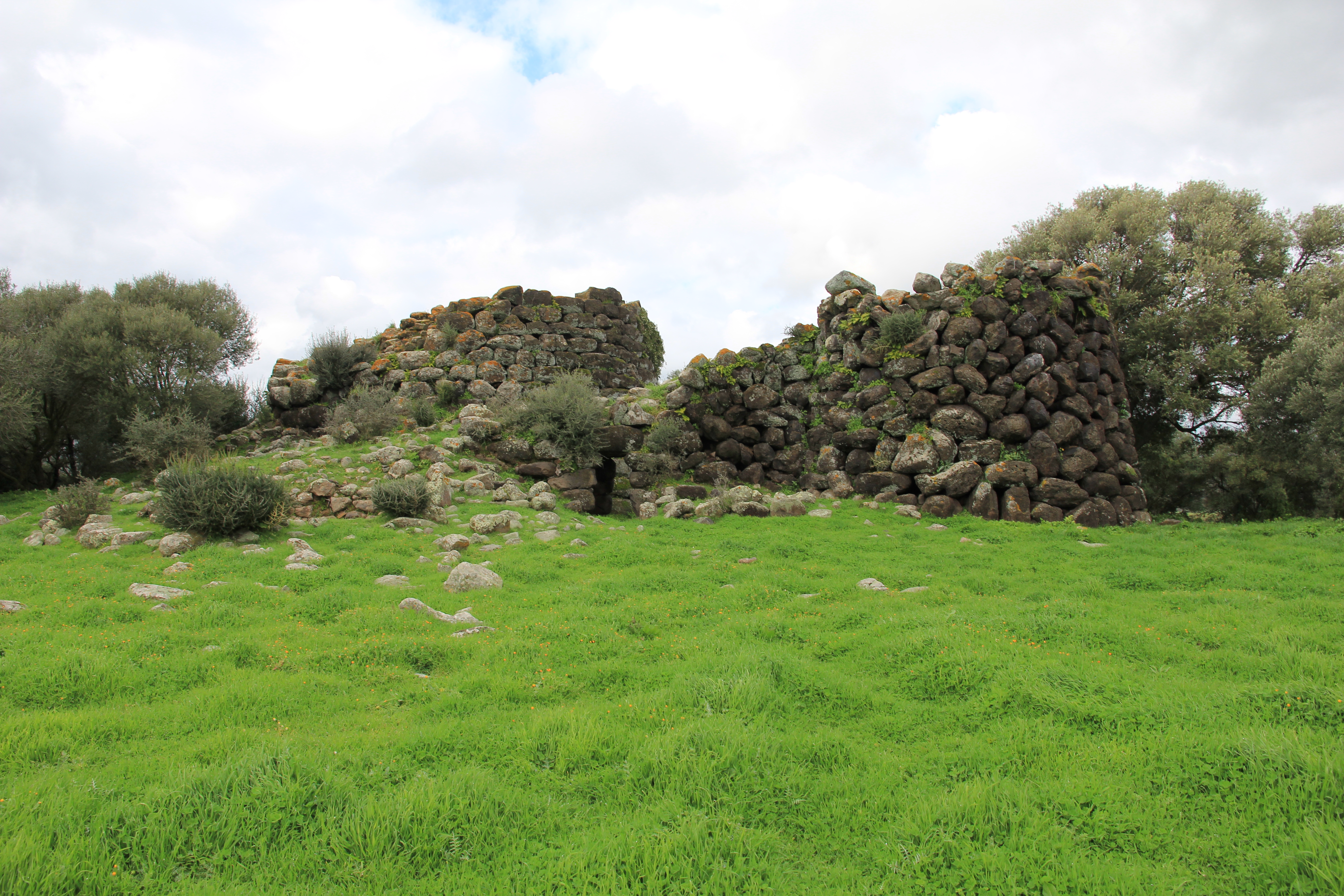 Villanova Truschedu - Nuraghe Santa Barbara